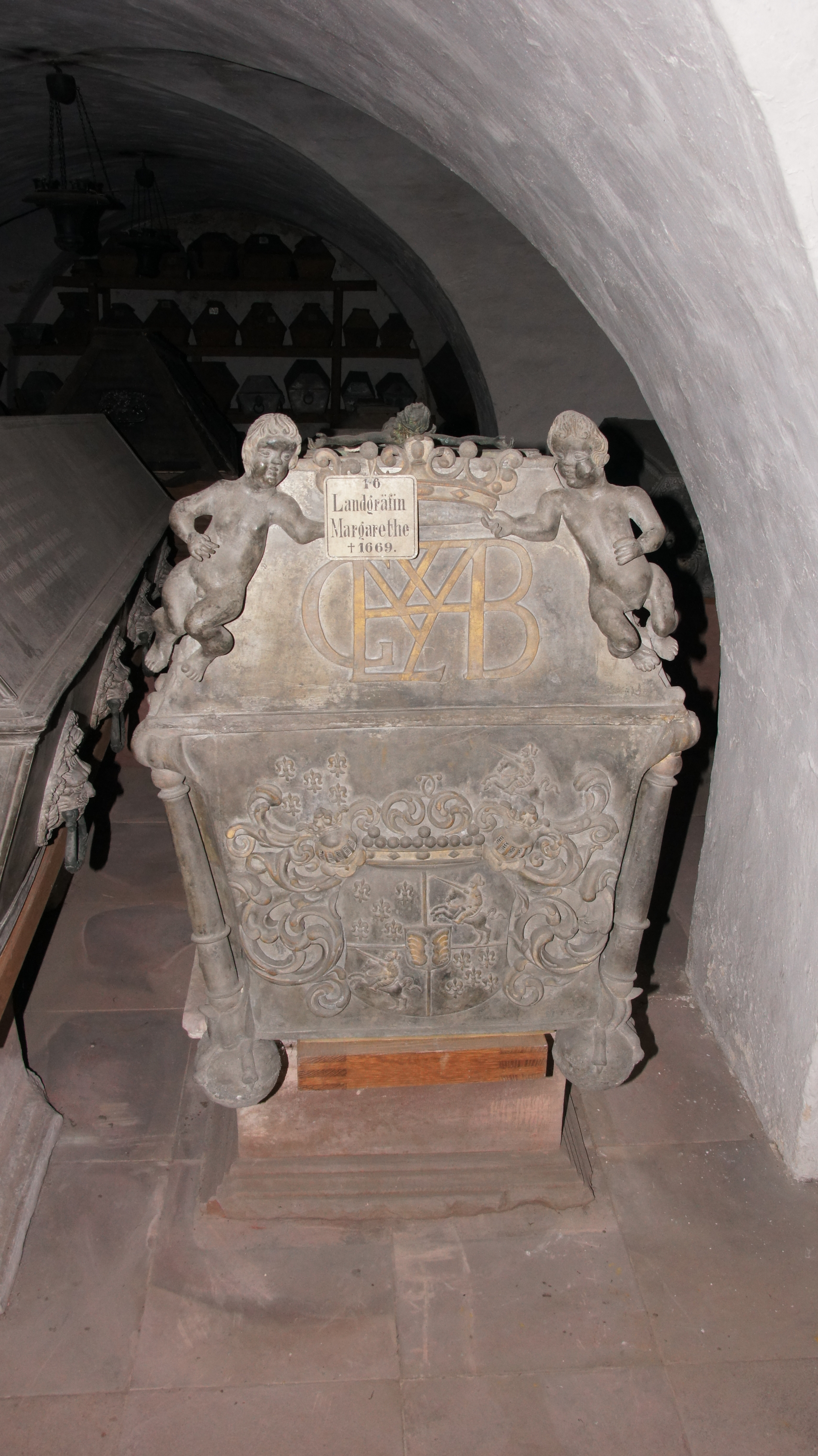 Bad Homburg vor der Höhe, Schloss, Gruft, Landgräfin Maragethe